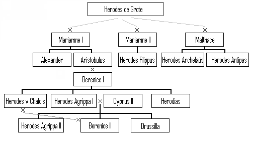 Stamboom van Herodes Agrippa